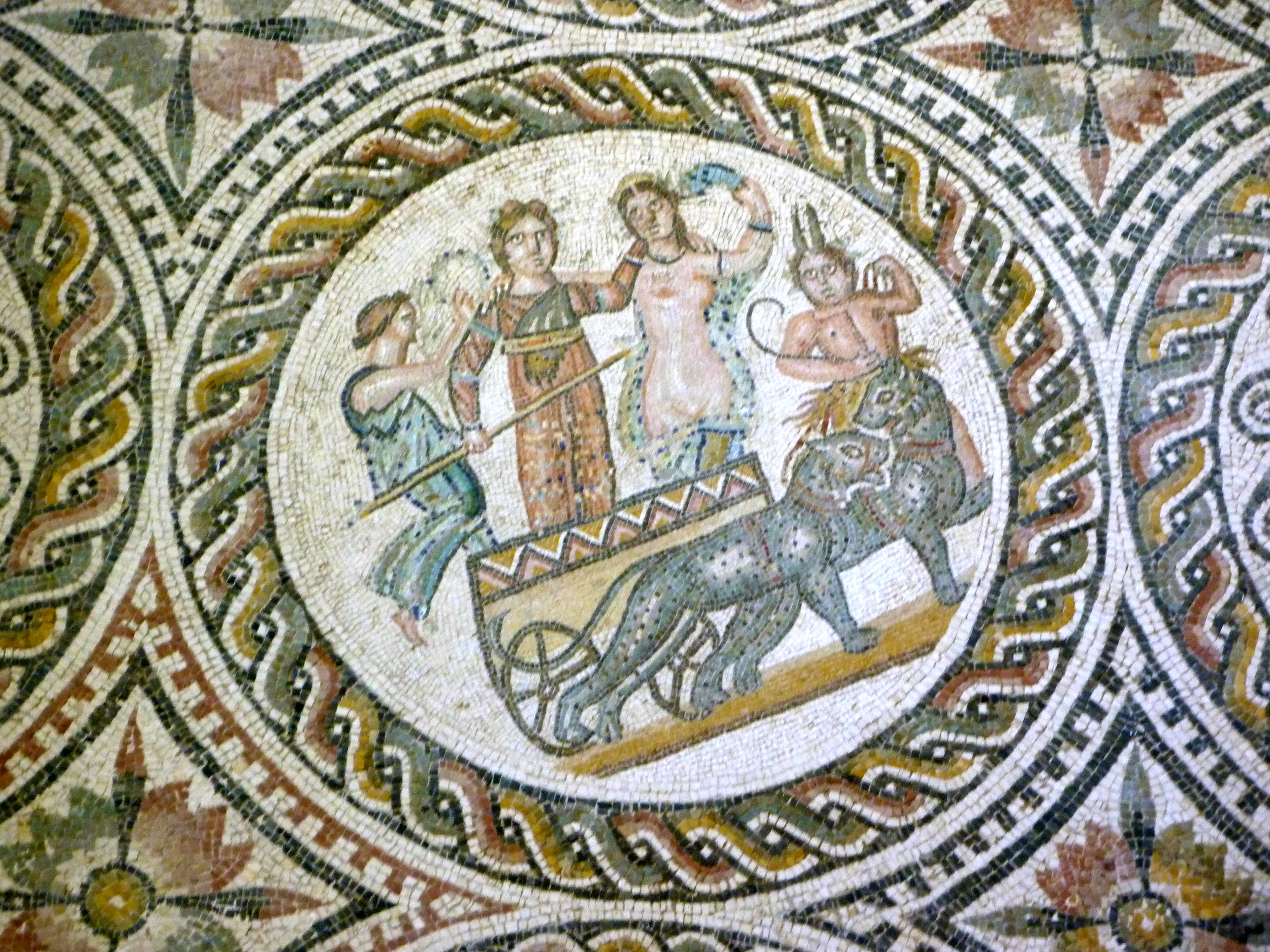 Bachhus and Arianna - Sabratha - Museum mit Funden aus der Römerzeit, Mosaik05